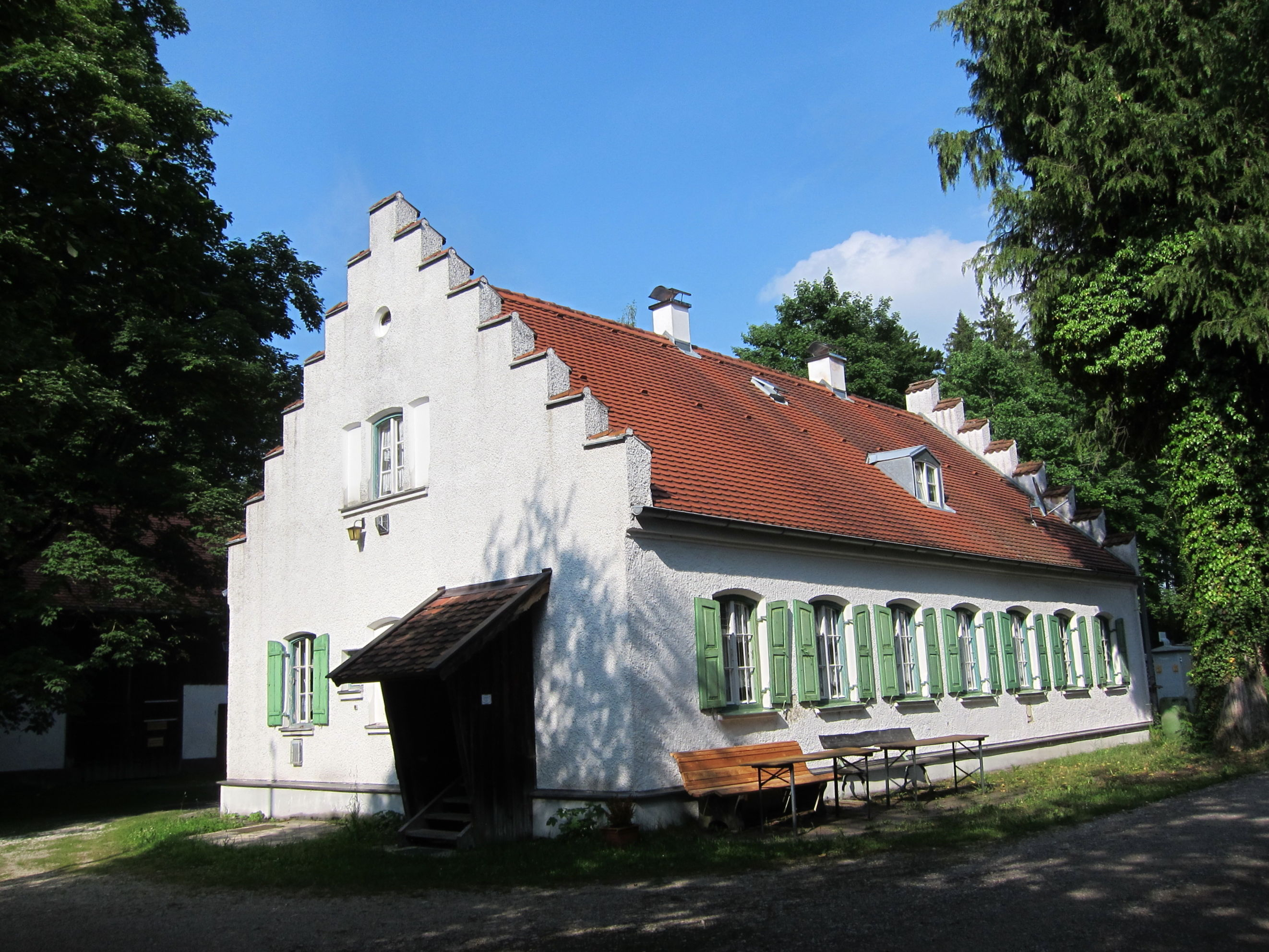 Ebersberger Forst (Eglhartiinger Forst), Forsthaus Diana; Massiver zweigeschossiger Bau mit Staffelgiebel, 1854 erbaut als Parkjäger-Wohnhaus.